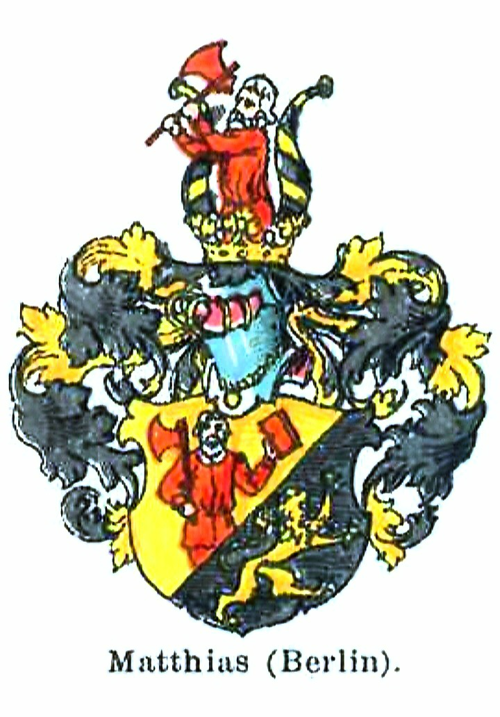 Wappen derer patrizischen Familie Matthias zu Berlin, 1558 in den Reichsadel erhoben.